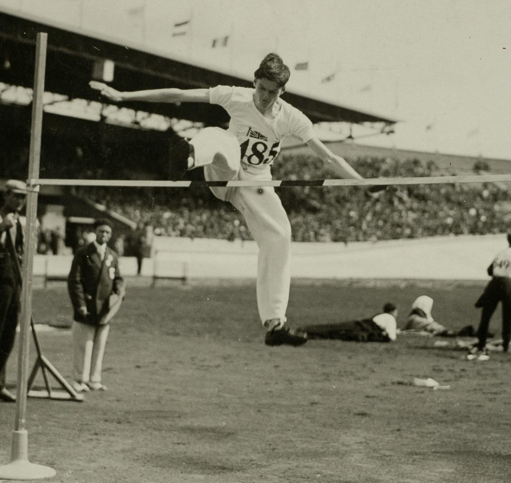 Sport. Sport, Olympische Spelen Amsterdam, 1928 : De Engelse hoogspringer H.A. Simmons in actie.